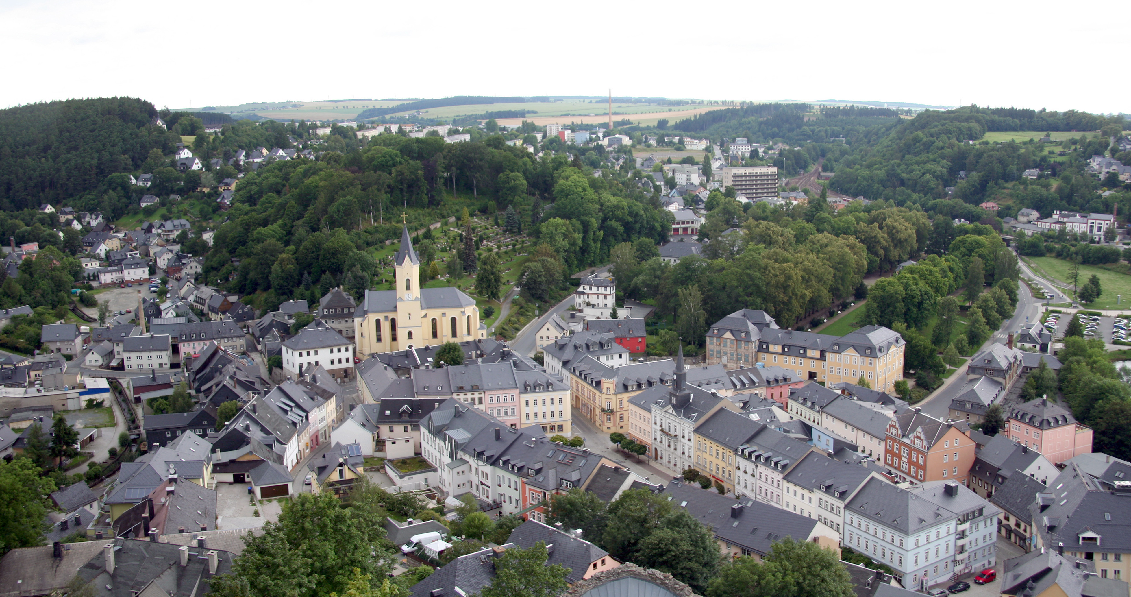 Bad Lobenstein: Blick vom Bergfried über die Innenstadt nach Norden